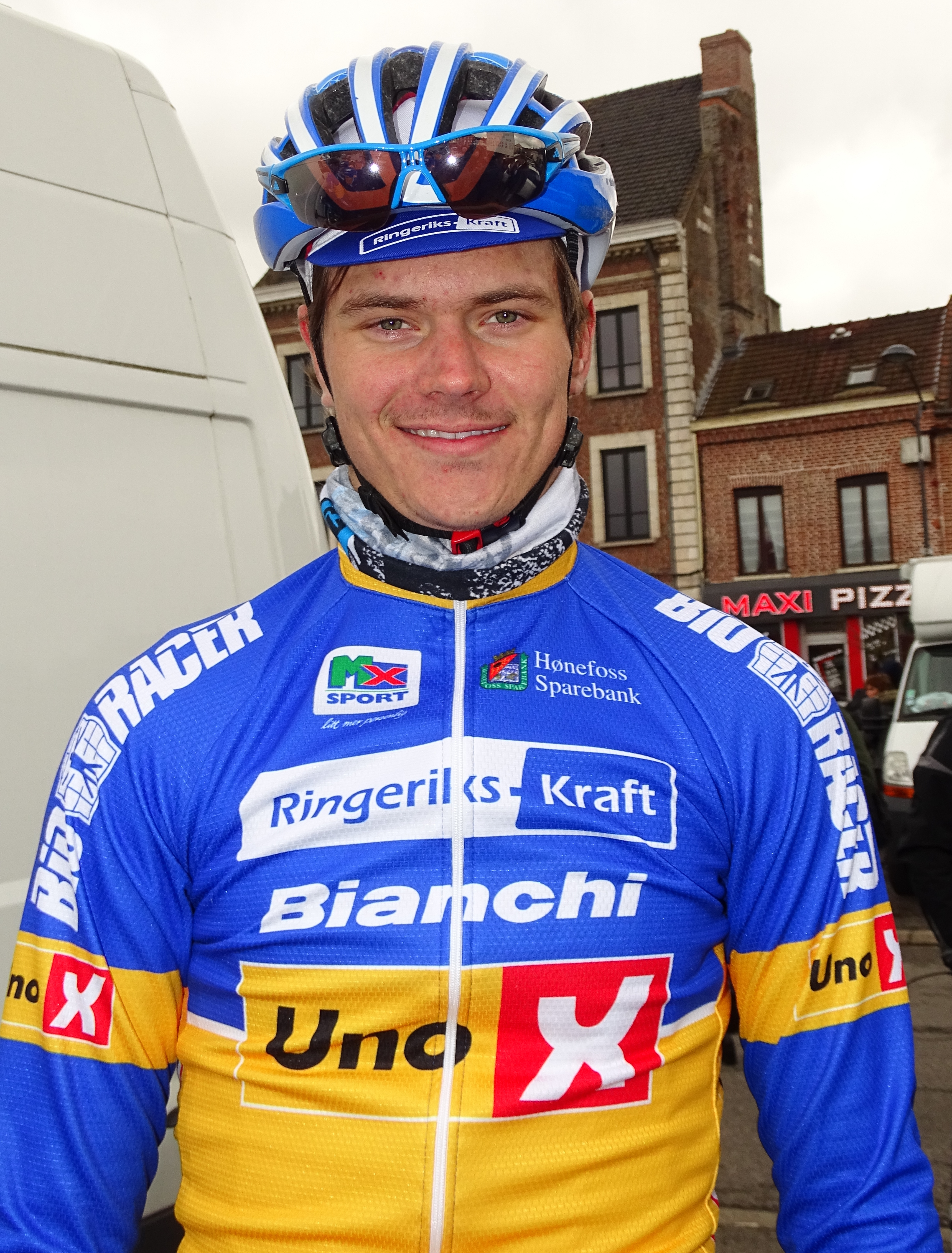 Reportage réalisé le dimanche 6 mars à l'occasion du départ et de l'arrivée du Grand Prix de Lillers-Souvenir Bruno Comini 2016 à Lillers, Pas-de-Calais, Nord-Pas-de-Calais, France.